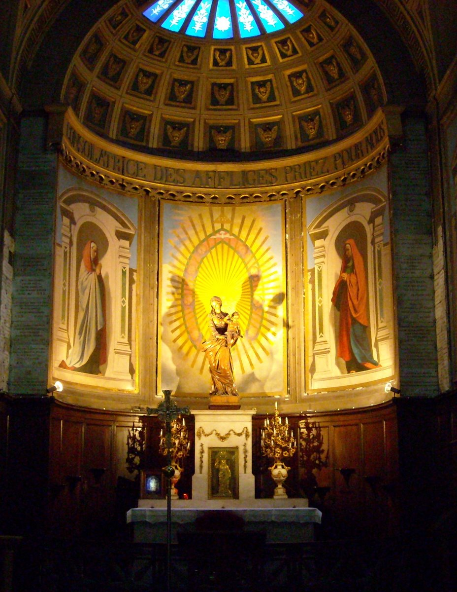 Chapelle de la Vierge - Église Notre-Dame de Bonne-Nouvelle